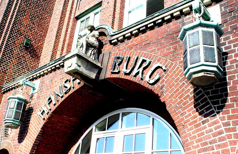 Fassade der "Hansaburg" in Hamm-Süd, einem historischen Gebäude der ehemaligen Papierverarbeitung Lehmann und Hildebrandt. This is a photograph of an architectural monument.